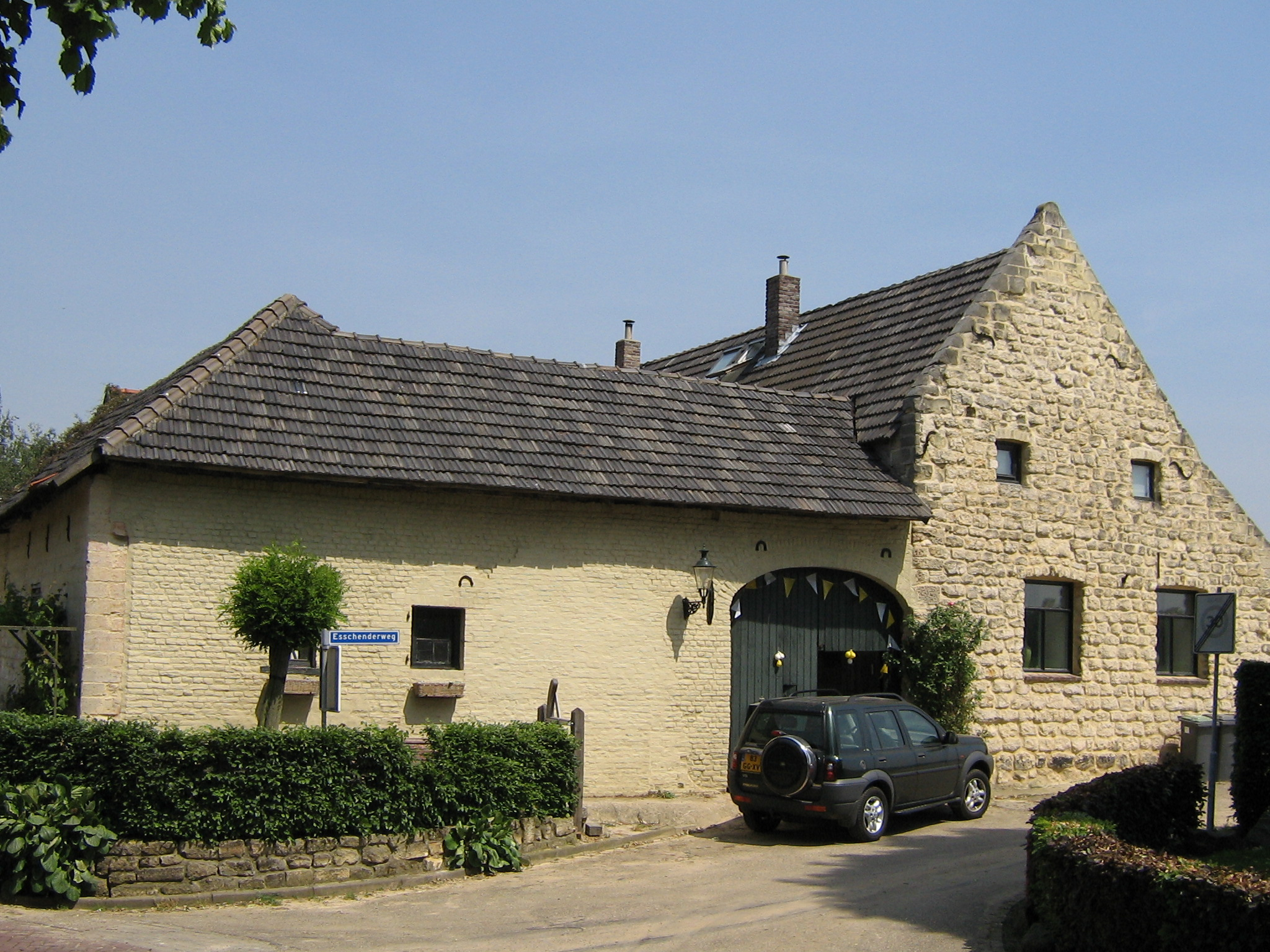 Haof i Geweustrao Hereboerderij in Weustenrade (gemeente Voerendaal, Nederlands Limburg) Farm in Weustenrade (Voerendaal community, NL)